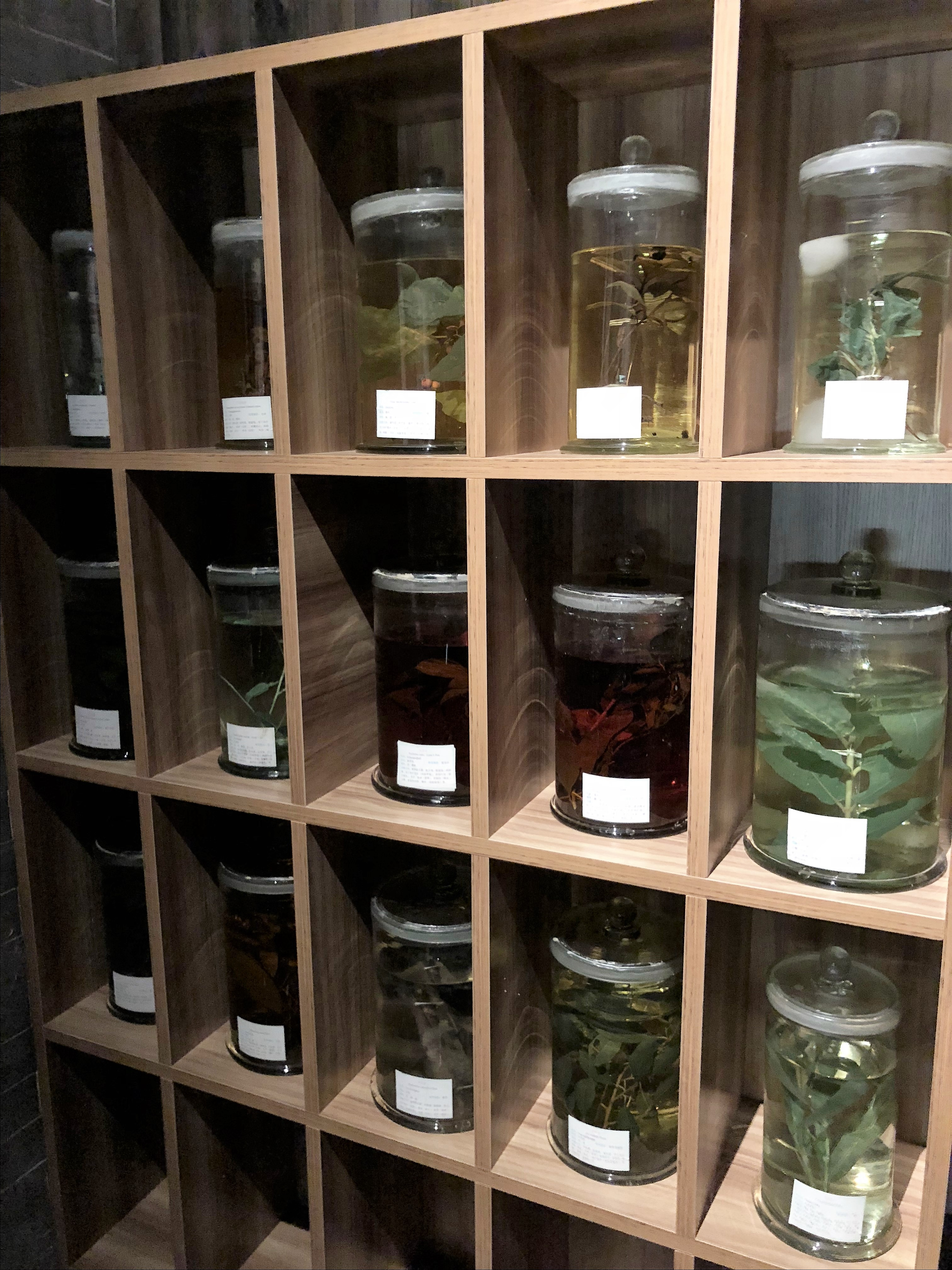 中文（中国大陆）: 壮族药材。